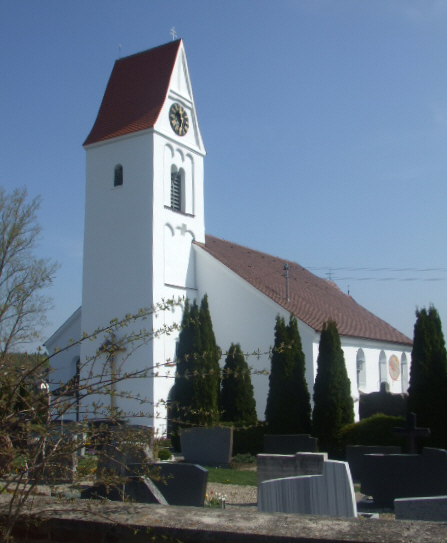 Pfarrkirche St. Petrus in Ketten, Haslach, Gemeinde Rot an der Rot Außenansicht